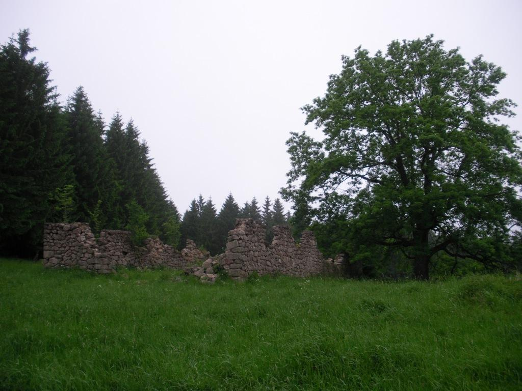 Grundmauern des ehemaligen Viehhofs Scharfenstein, Harz